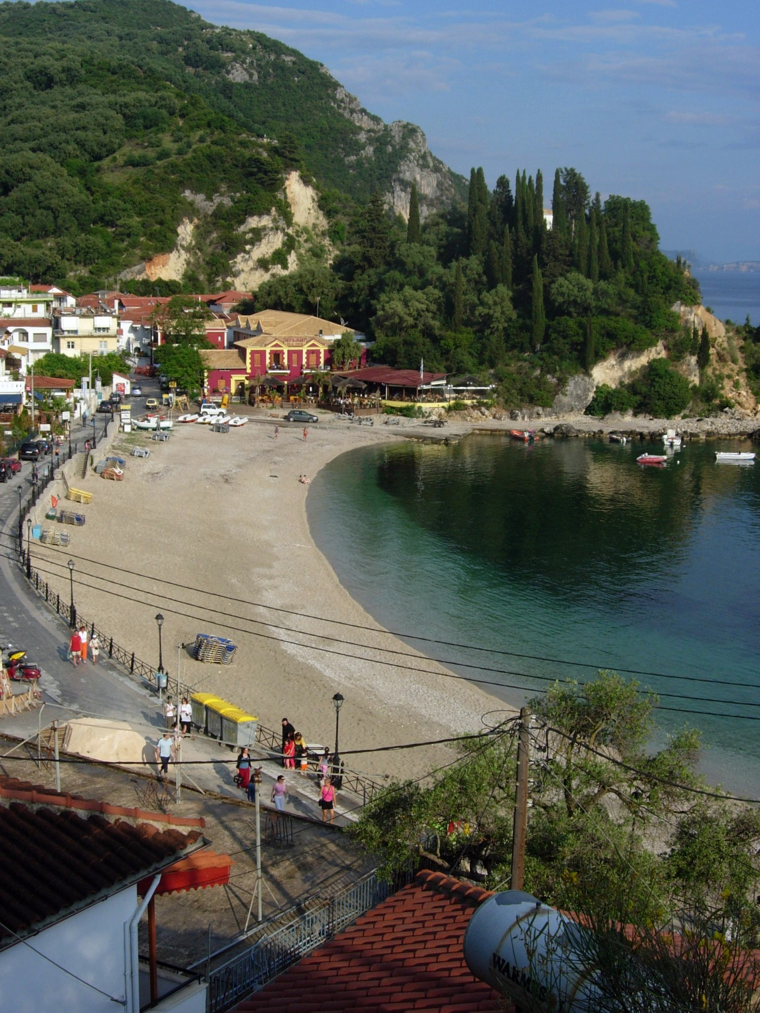 Krioneri beach in Parga